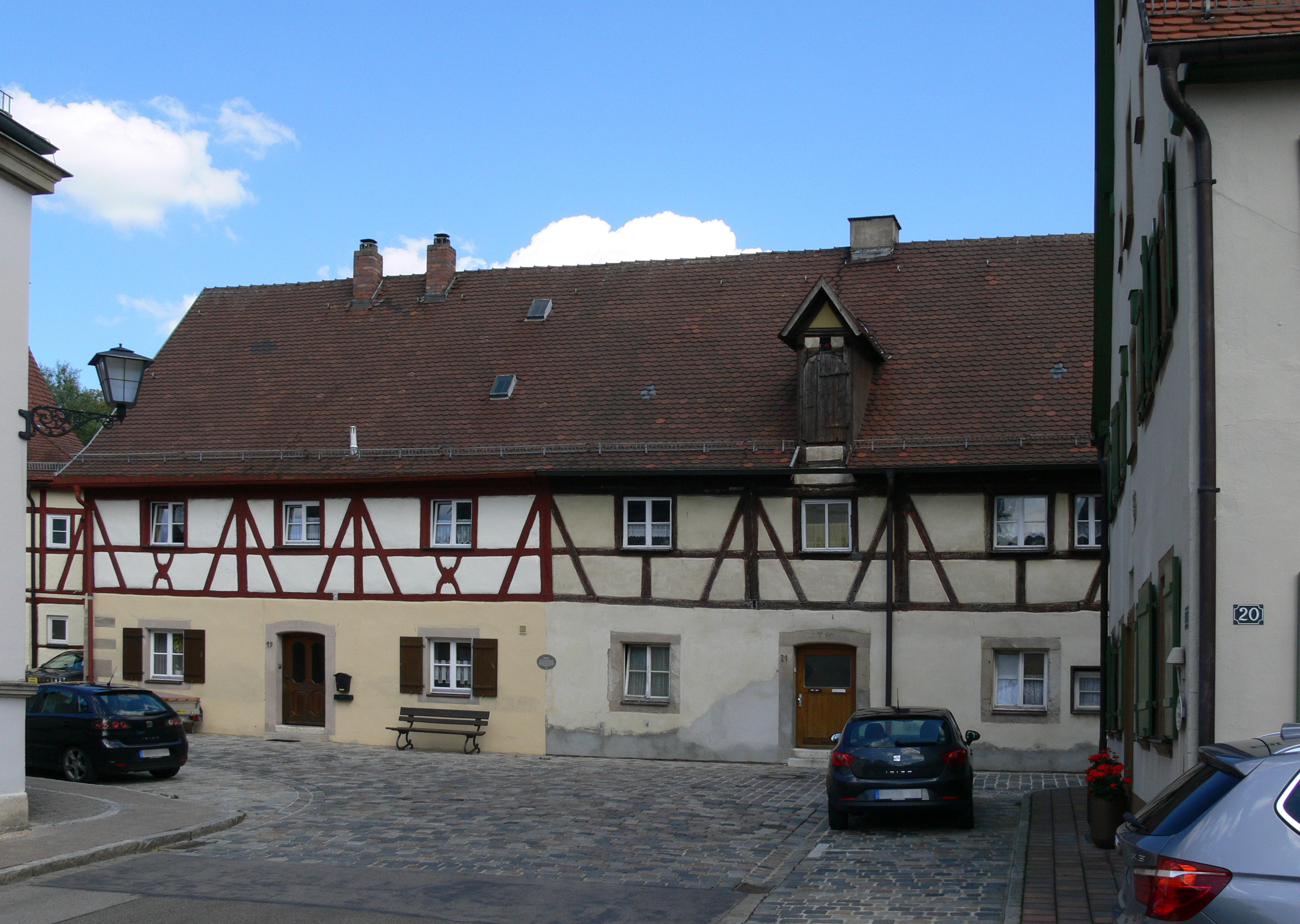 denkmalgeschütztes Doppelhaus in Weißenburg (Bayern), Seeweihermauer 19 und 21This is a photograph of an architectural monument., no. D-5-77-177-439